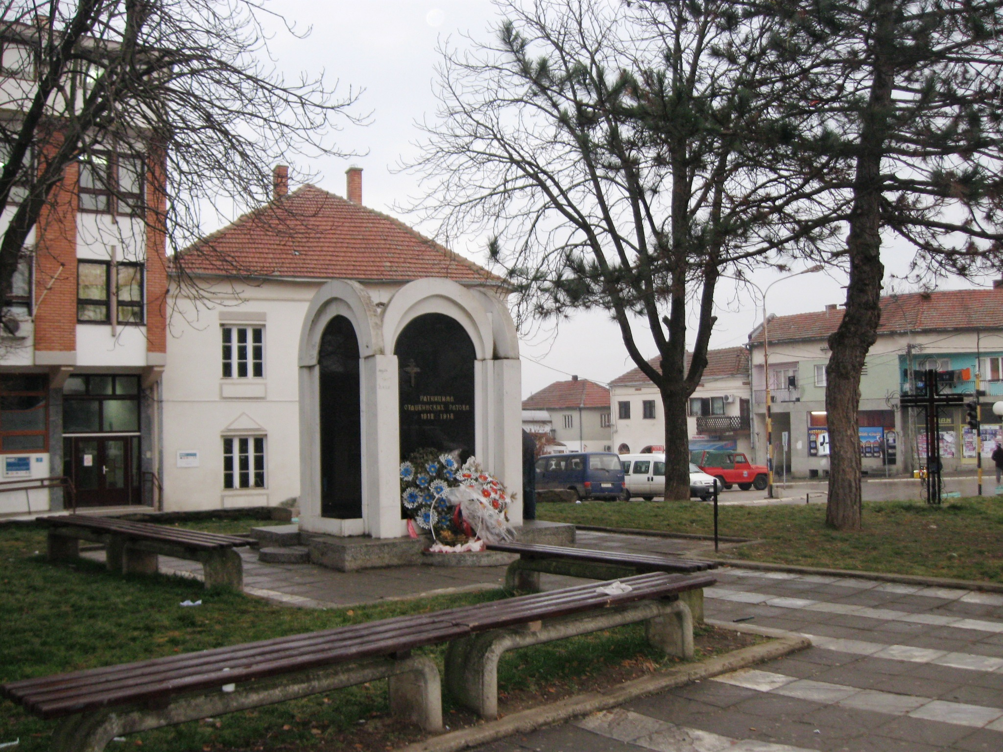 Bojnik